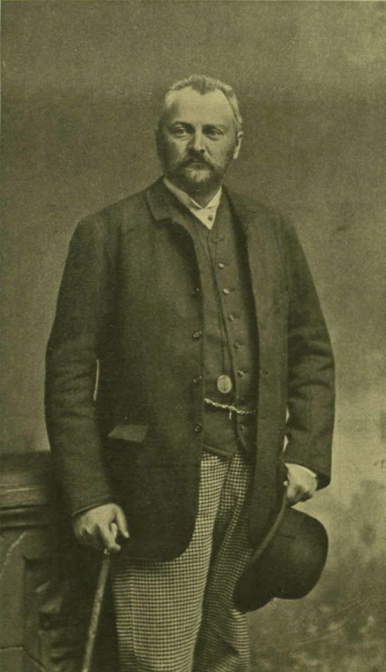 Gróf Károlyi Tibor, a főrendiház elnöke, az "Ecsedi láp-lecsapoló és Szamos balparti árvíz-levezető és belvíz-szabályozó társulat" elnöke